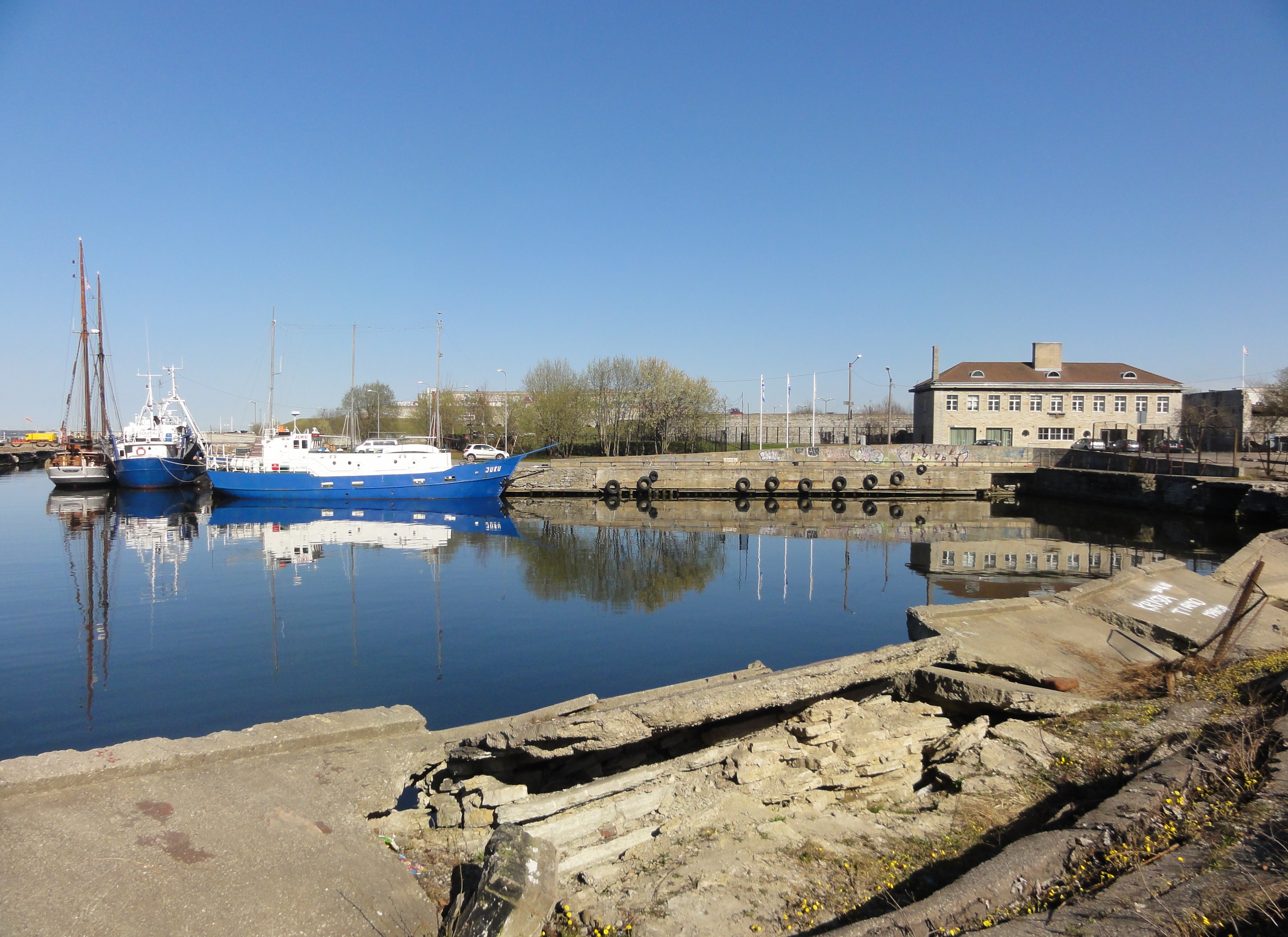 Kalasadam